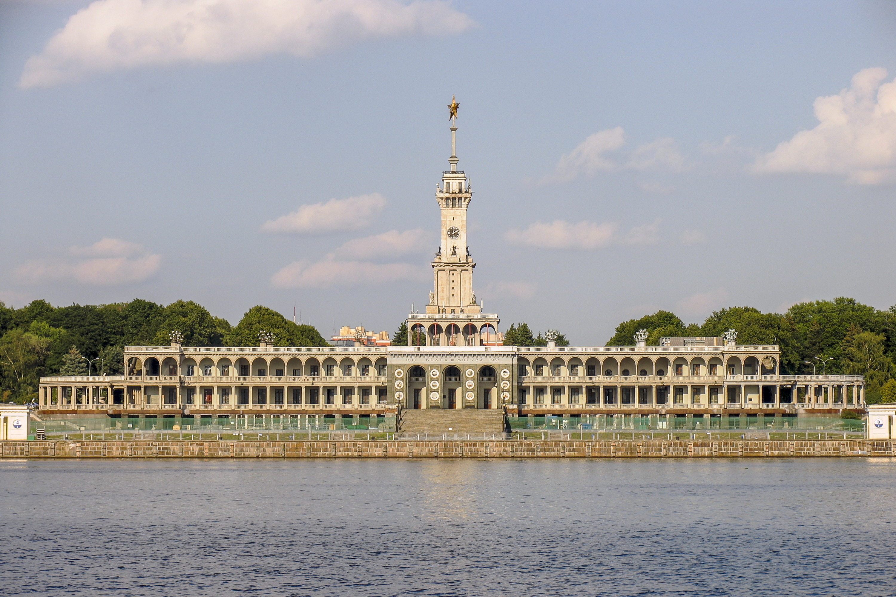 Московский северный речной вокзал.